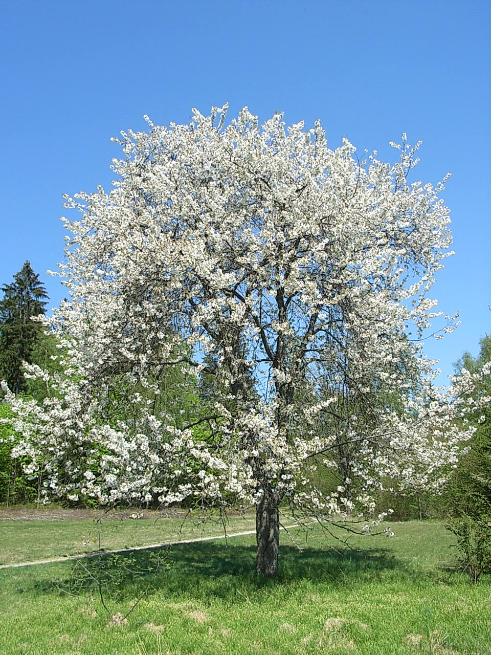 VOGELkirsche bei Ableg, Stadt Zwiesel, Bayerischer Wald